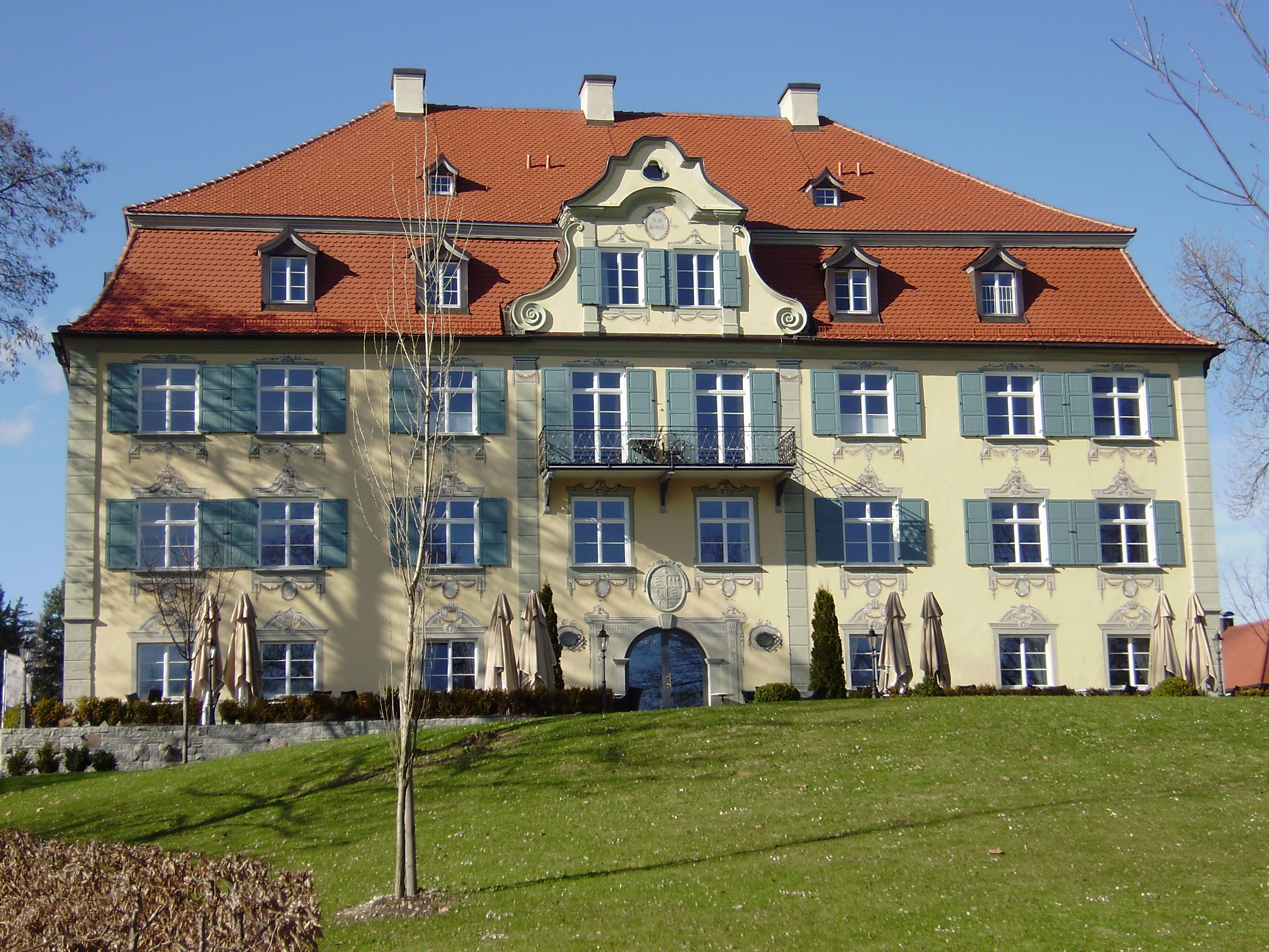 Schloss Neutrauchburg bei Isny von Süden